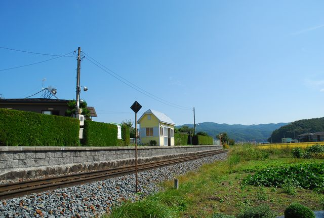 太田部駅